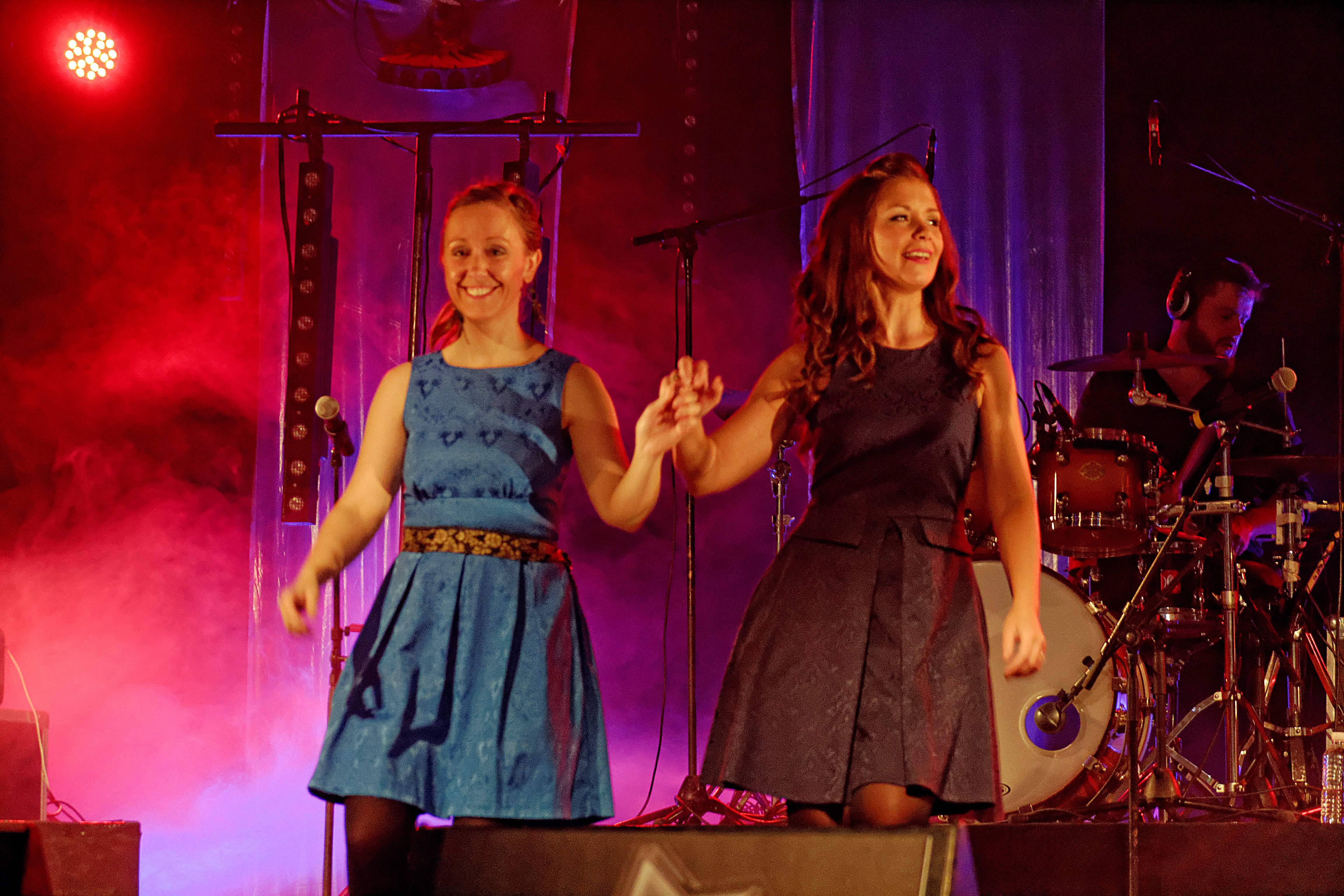 Urban Trad, dans sa nouvelle formation, en tournée en Bretagne, dans le cadre du Stered Festival le 13 Novembre 2015 au Parc des Expos de Langolvas à Morlaix.